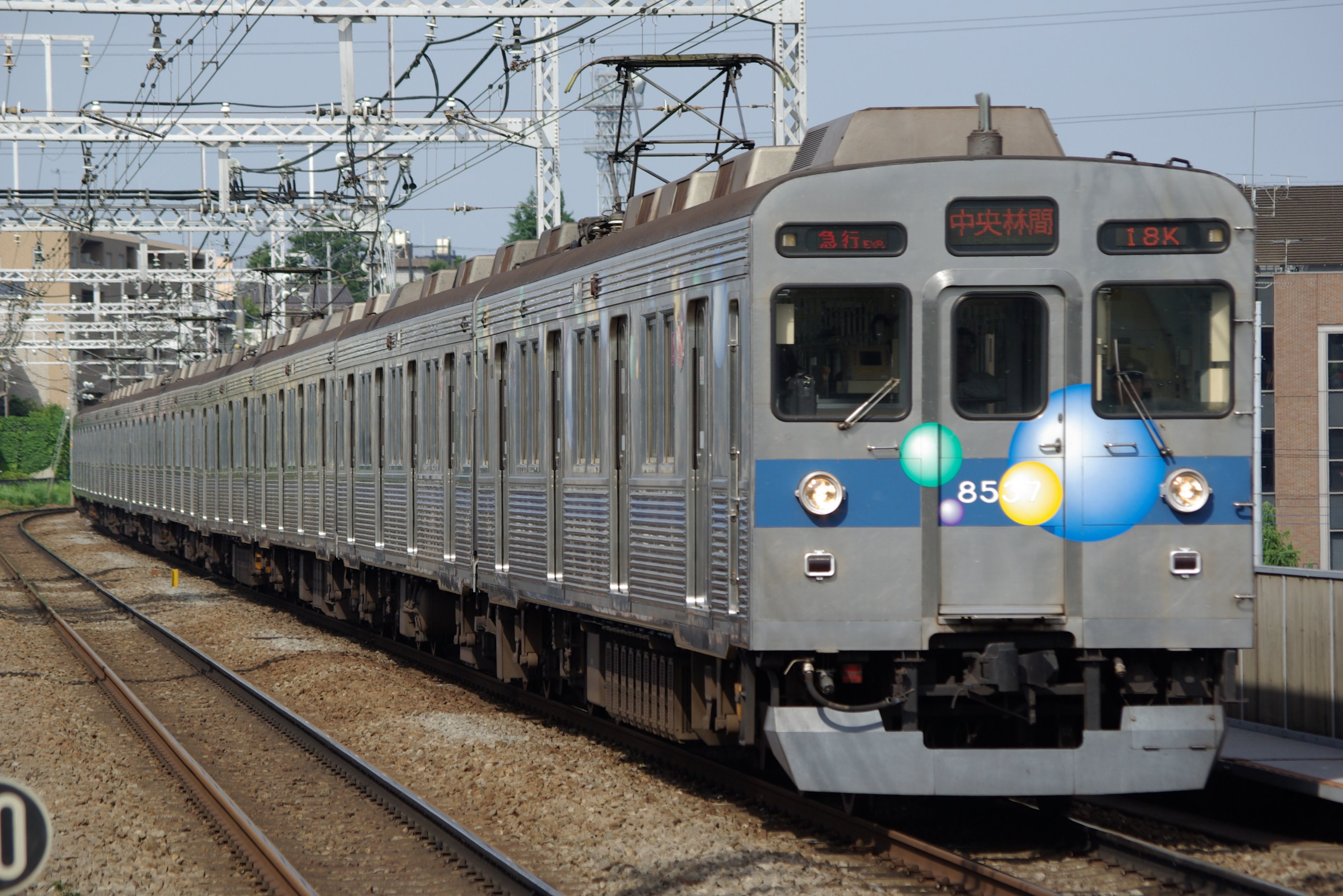 東急8500系8637編成